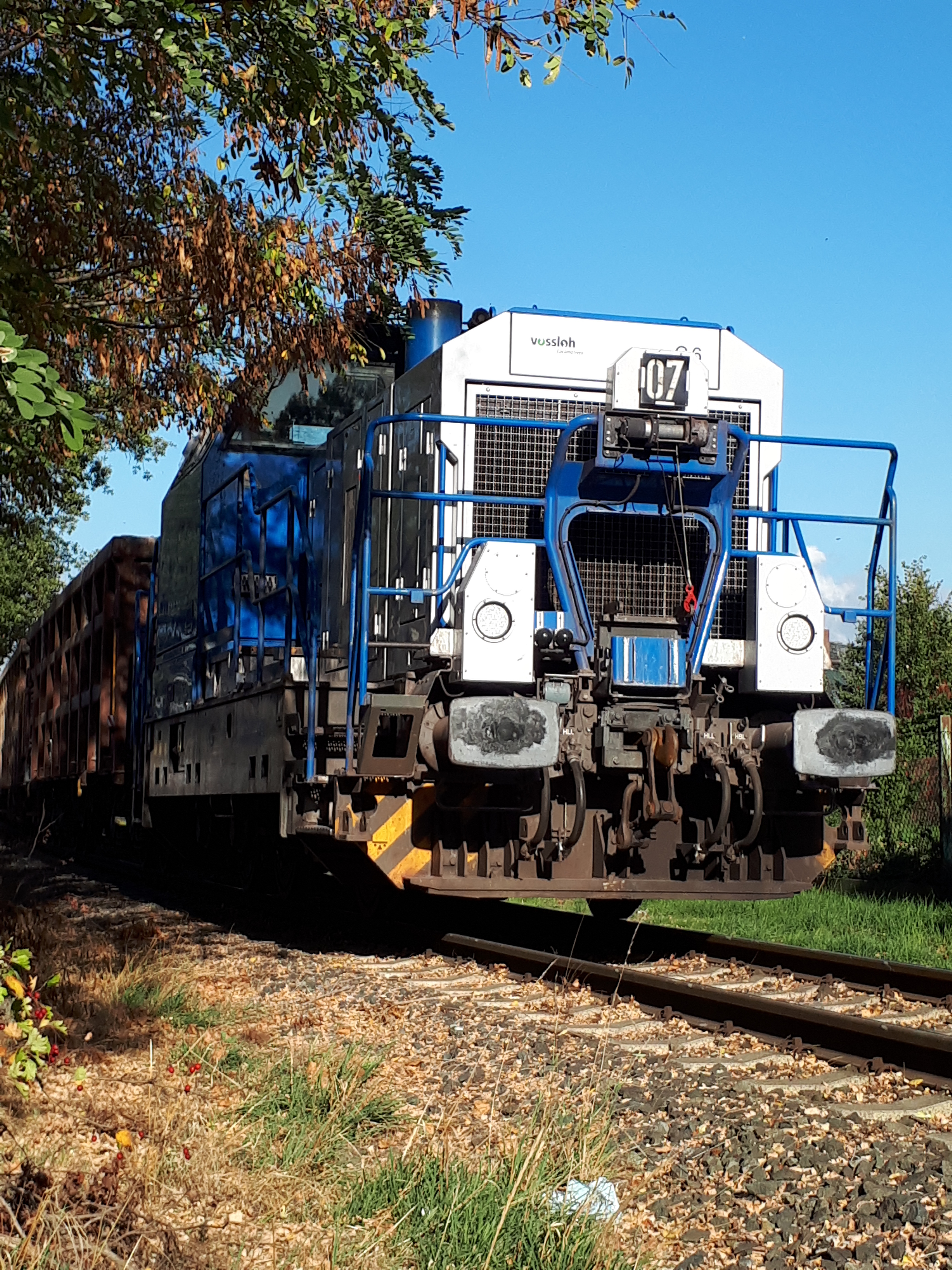 Eine Vossloh G6 der Verkehrsbetriebe Peine-Salzgitter nach dem Bahnübergang Wiesenstraße in Peine unterwegs in Richtung Ilsede